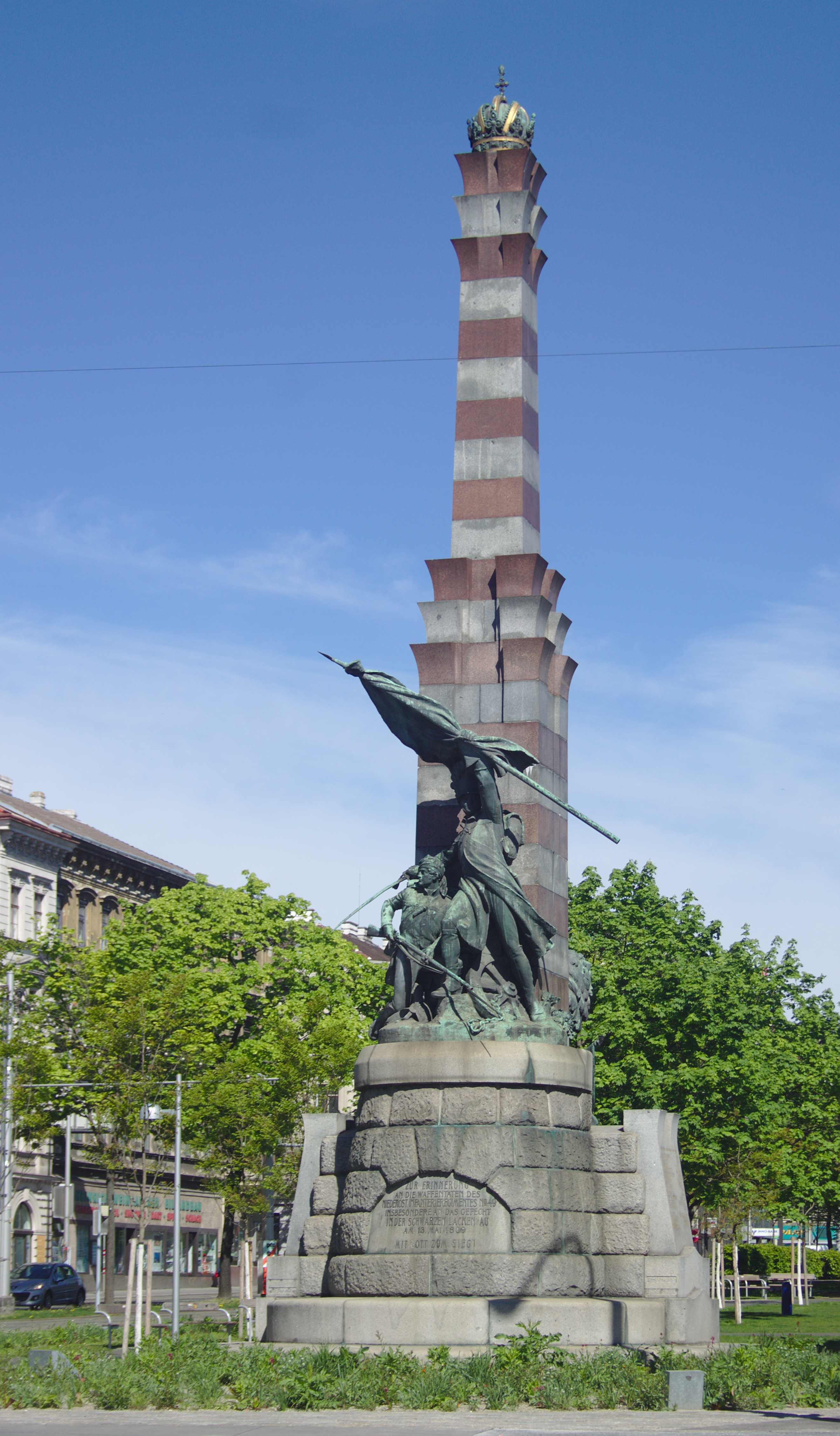 Ereignisdenkmal, Denkmal des niederösterr. Infanterie-Regiments Nr. 49, 13.5.1809, Hesser-Denkmal